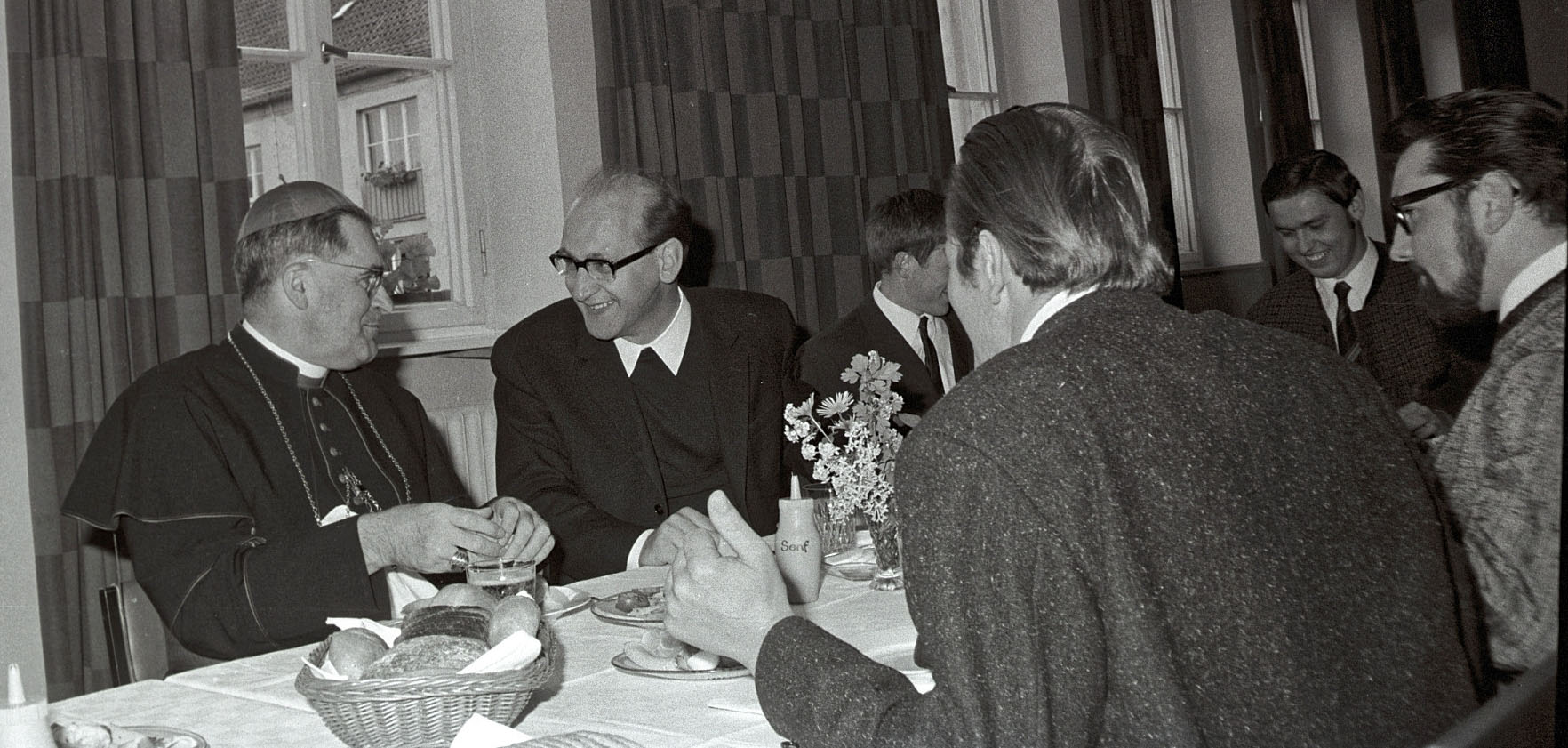 Kardinal Julius Döpfner im Speisesaal des Spätberufenenseminars Wolfratshausen-Waldraum, zusammen mit Spiritual Gilbert Niggl, Foto von 1967, aufgenommen mit einer Exa Ia - Kamera (Schachtsucher), auf Ilfordfilm. Film und Foto wurden im Fotolabor des Seminars entickelt.